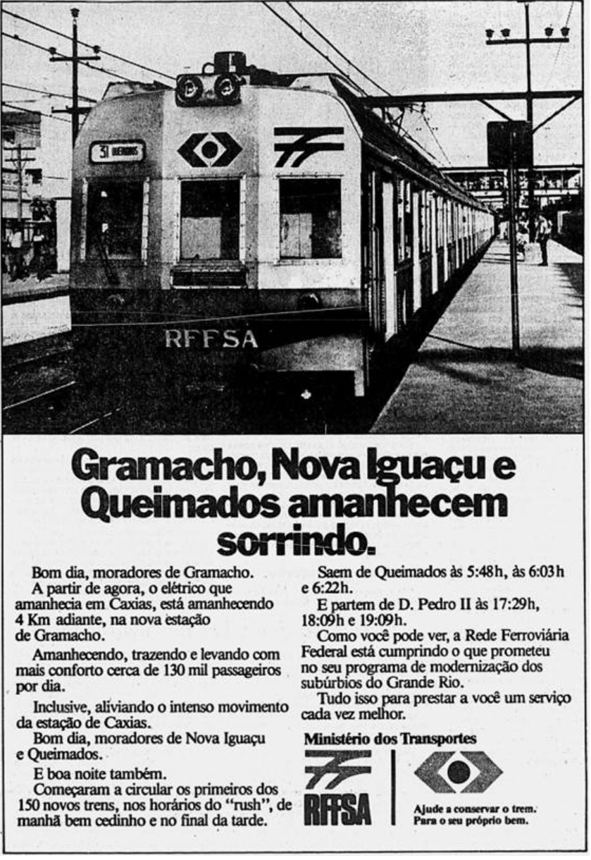 Anúncio do início da operação dos Trens Cobrasma Série 900 da RFFSA. Anúncio da Rede Ferroviária Federal (RFFSA) publicado nos principais jornais do estado do Rio de Janeiro.